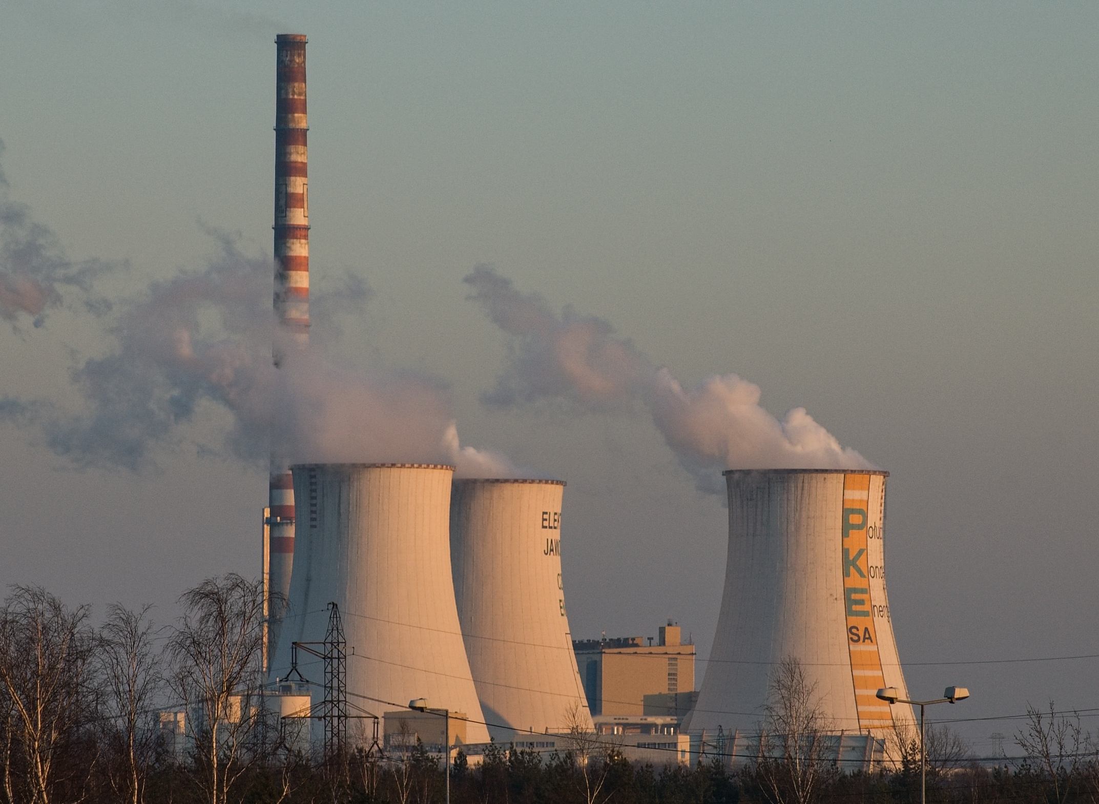 Jaworzno III power station